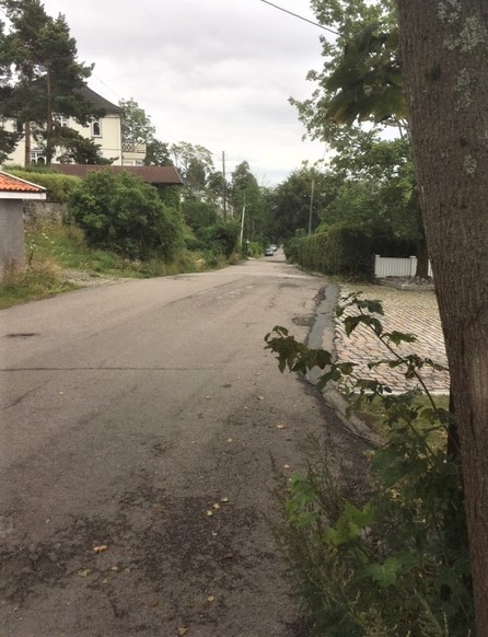 Furubråtveien i Oslo august 2019